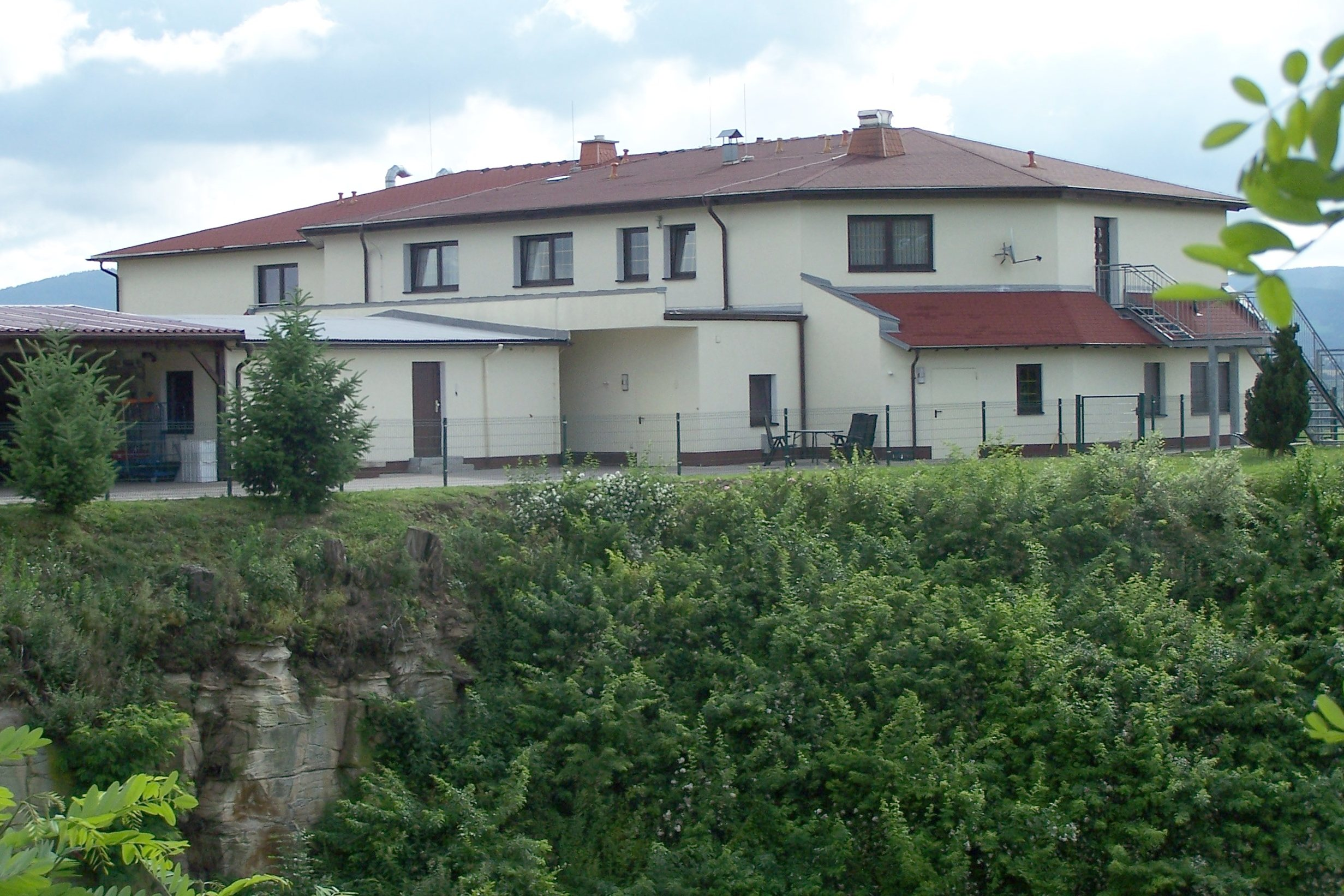 Das Hotel Panoramablick auf dem Gipfel des Frankensteins bei Bad Salzungen.